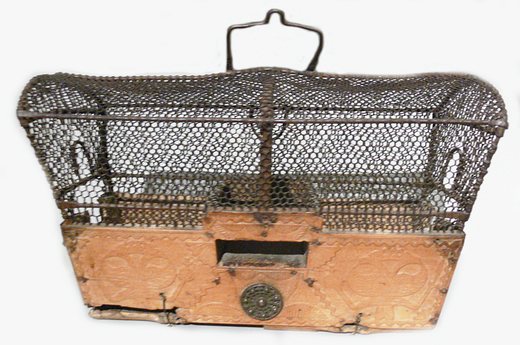 Vogelkäfig, Württemberg 18./19. Jh. Landesmuseum Württemberg (Außenstelle Museum für Volkskultur in Württemberg, Waldenbuch)